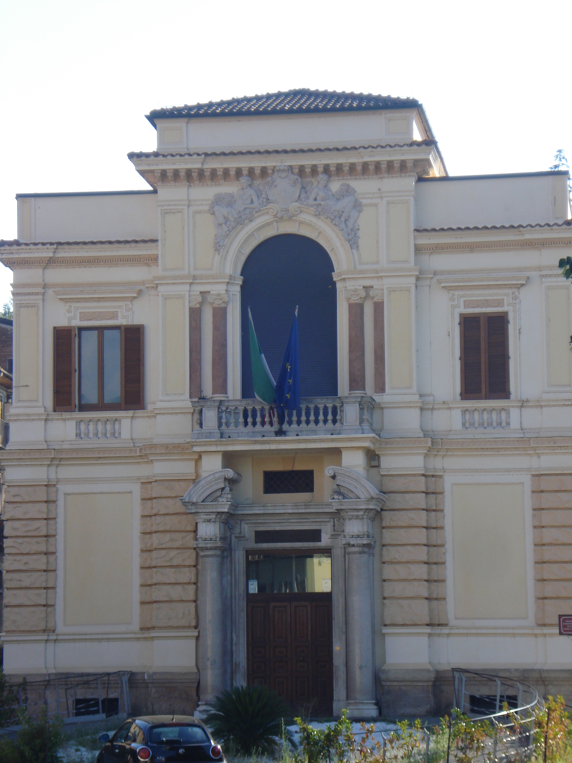 Facciata dell' Edificio ex Banca Popolare Cosentina a Piazza dei Valdesi a Cosenza centro storico.